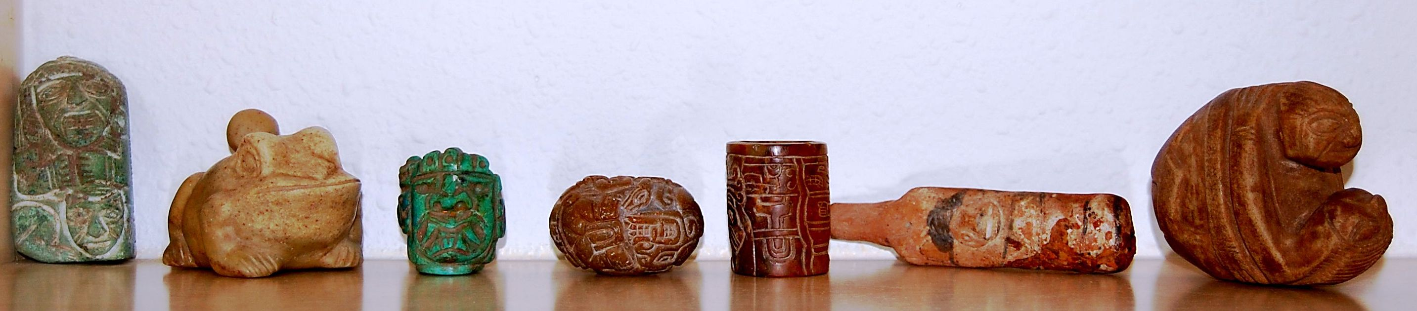 Arte Mochica